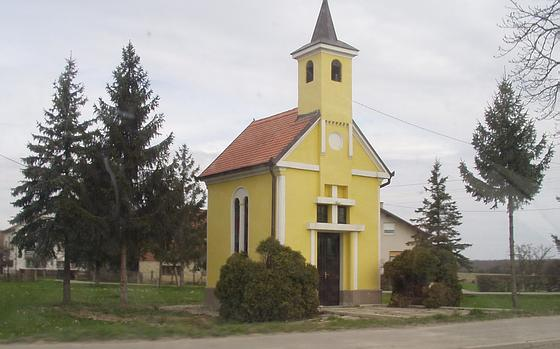 kapelica u Luki pokraj Vrbovca